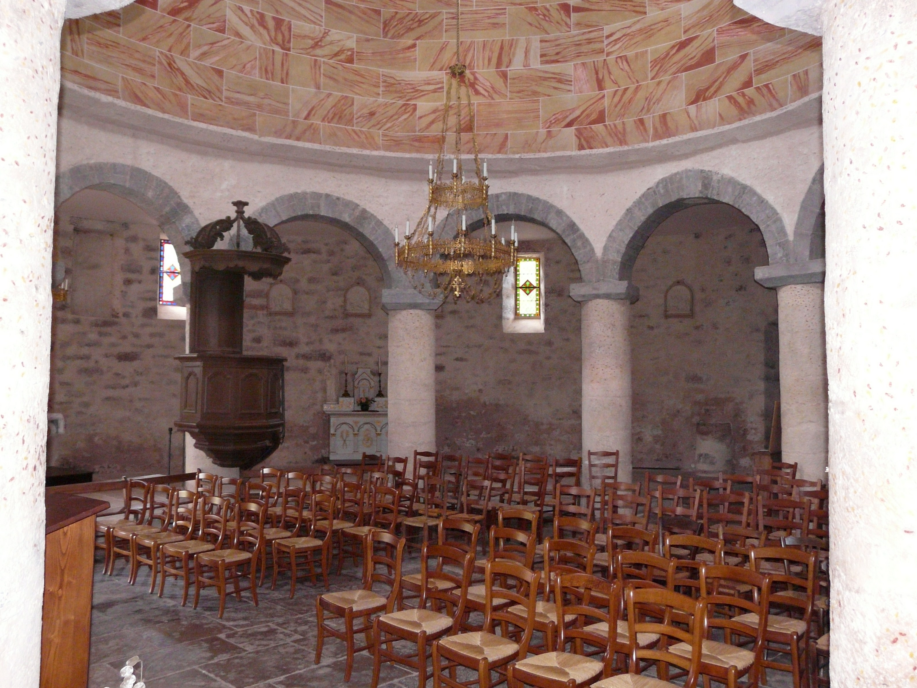 La nef de l'église, Saint-Bonnet-la-Rivière, Corrèze, France.